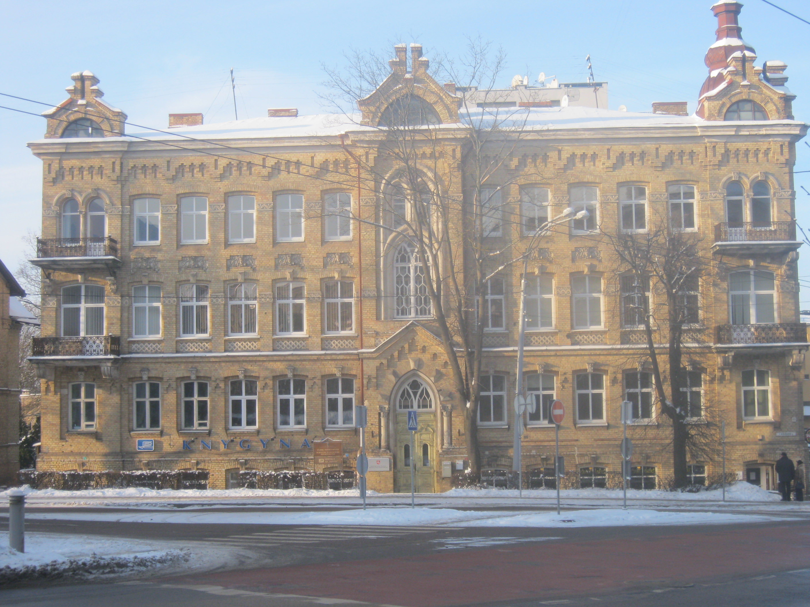 Zigmanto Sierakausko gatvė 15, Vilnius